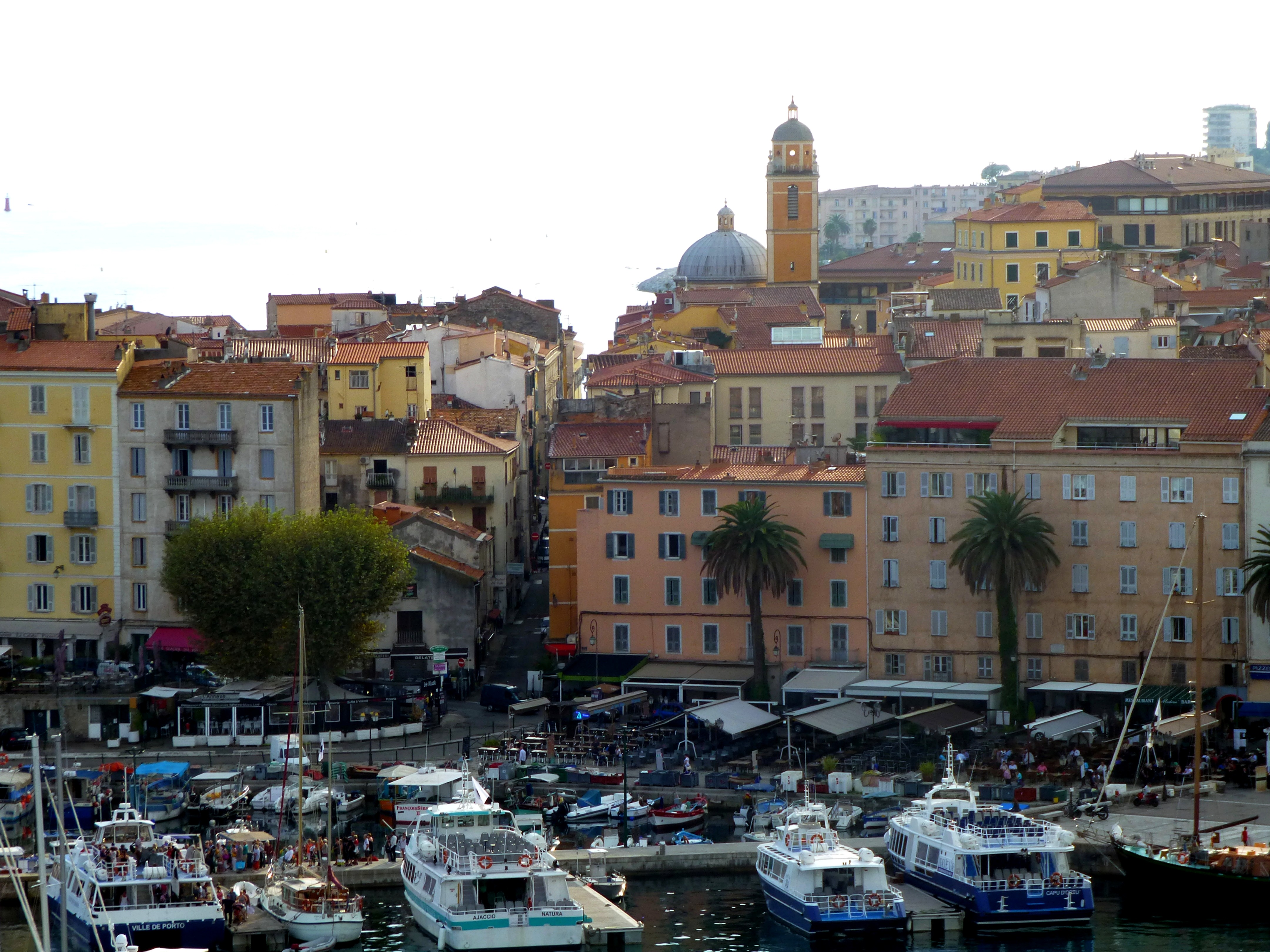 Korsika - Ajaccio – Quai Napoléon - Rue Notre Dame - Kathedrale Notre-Dame-de-l’Assomption